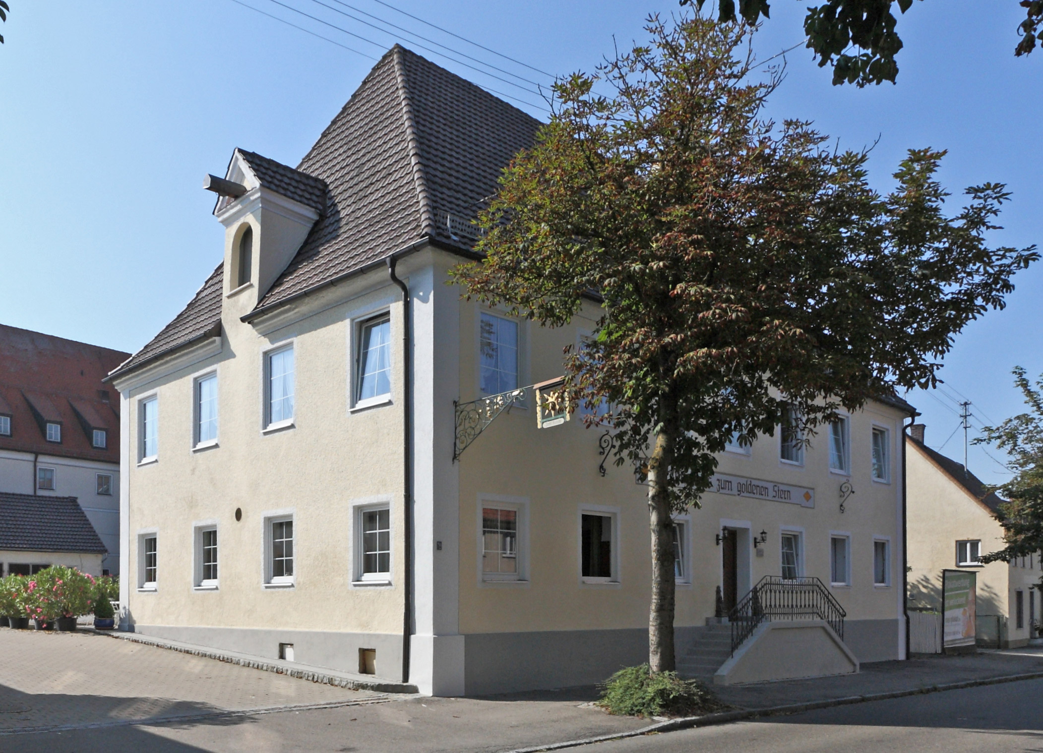 Ehemaliges Pflegamtshaus, jetzt Gasthof "Zum goldenen Stern", Hauptstr. 12, Ansicht von Nordosten